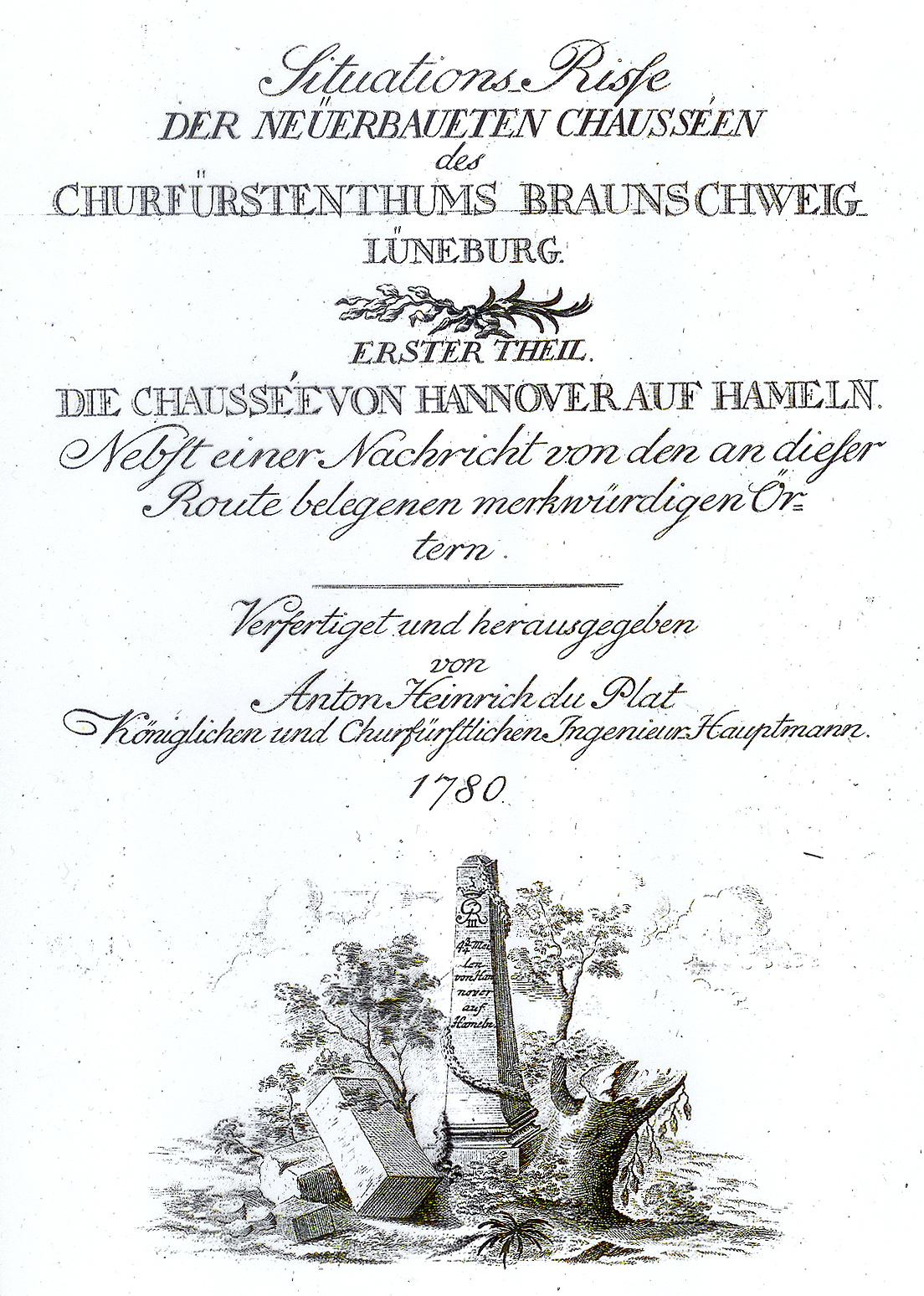 Literatur zur heutigen Bundesstraße B 217 (in Deutschland): Innentitel des 1780 von dem Königlichen und Kurfürstlichen Ingenieur-Hauptmanns, Kartografen, Straßen- und Wegebau-Ingenieurs und späteren Generalleutnants Anton Heinrich du Plat geschriebenen und herausgegebenen Buch „Situations-Risse der neüerbaueten Chausséen des Churfürstenthums Braunschweig -Lüneburg. Erster Theil. Die Chaussée von Hannover auf Hameln. Nebst einer Nachricht von den an dieser Route belegenen merkwürdigen Örtern ... “ mit dem Kupferstich des Meilensteines mit der den Initialen von König Georg III.. (GR = Georg Rex) und der Aufschrift „4 3/4 Meilen von Hannover auf Hameln“ ...